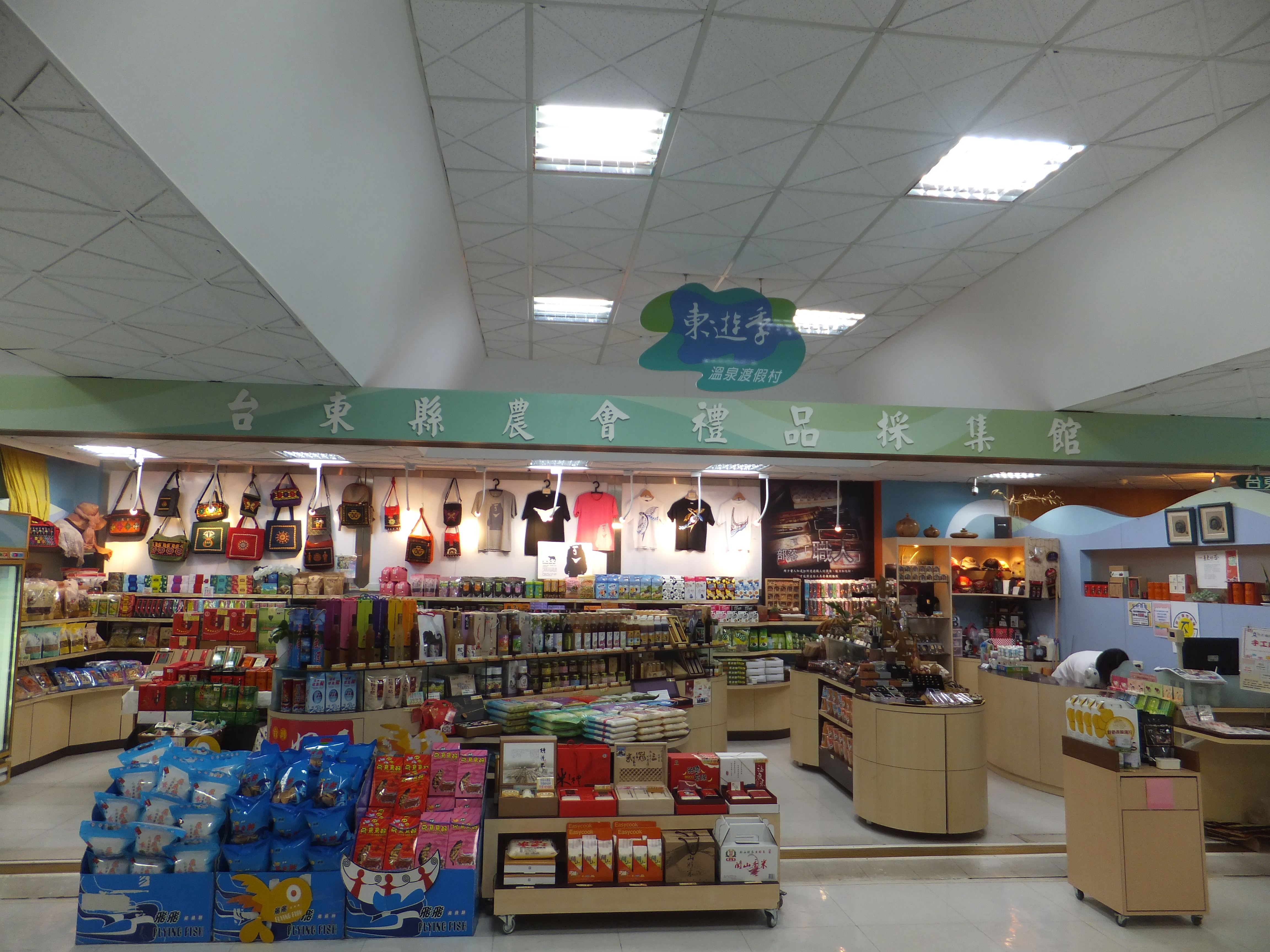 臺東機場航站大樓的臺東縣農會禮品採集館。